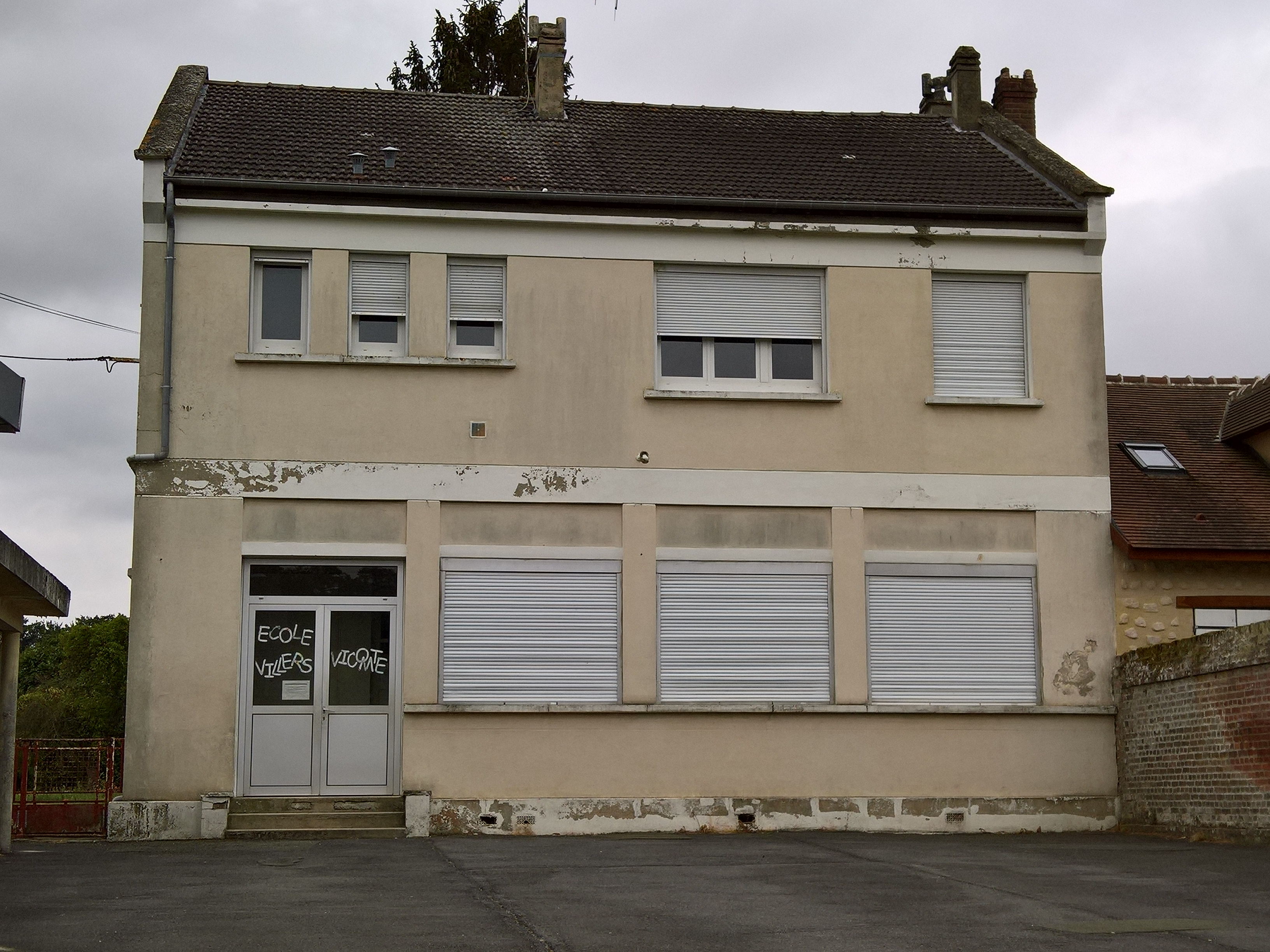 Villers-Vicomte : L'école